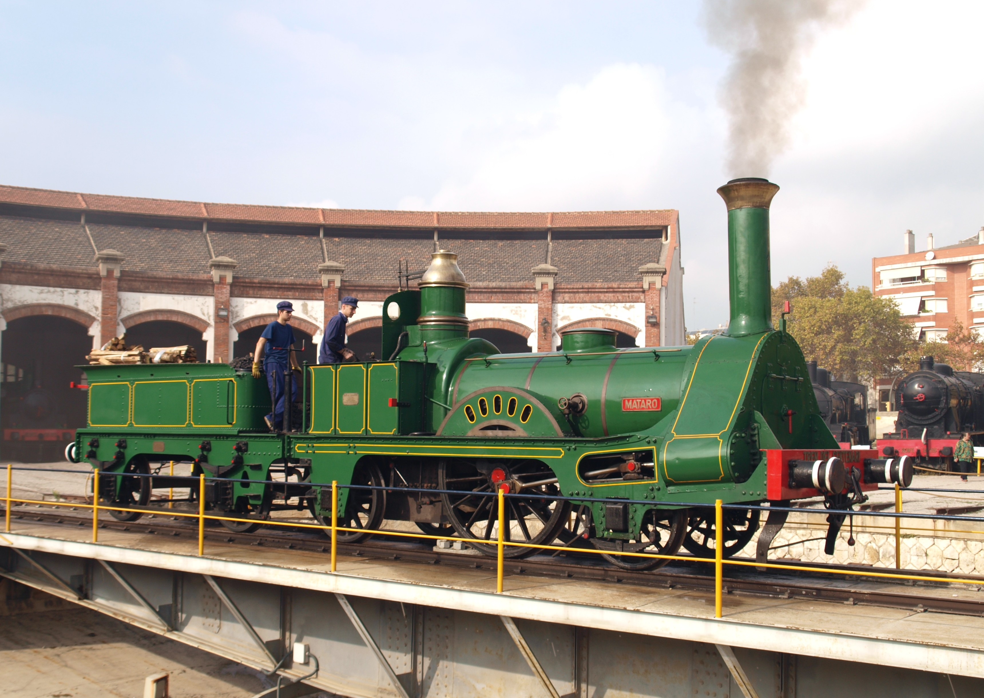 En 1848 se inauguró la línea entre Mataró y Barcelona, cuya construcción se contrató a MacKenzie & Brassey, con 4 Jenny Lind’s (1-1-1) compradas a la firma Jones & Potts Co. de Warrington, y 62 vagones de pasajeros + 2 coches-freno (break-vans) + 30 vagones descubiertos de mercancías, fabricados en la firma Joseph Wright & Sons de Saltley, Birmingham. [a la 1-1-1 los ingleses la llaman ahora Single) Para conmemorar el centenario del inicio de este FFCC. En 1948 La MTM construyó una réplica que es la que se mantiene en funcionamiento. La réplica no es exacta, debido a las penurias de la autarquía, como rueda motriz se instaló la de las Montañas que se construían para Renfe, de 1750mm de diam. en vez del original de 1880mm, además lleva bastantes elementos aunque escondidos o con aspecto antiguo. En 1848 es va inaugurar la línia entre Mataró i Barcelona, la construcció de la qual es va contractar a MacKenzie& Brassey , amb 4 Jenny Lind’s (1-1-1) comprades a la Firma Jones & Potts Co. de Warrington, a més de 62 vagons de passatgers + 2 cotxes-fre (break-vans) + 30 vagons descoberts de mercaderies, fabricats en la firma Joseph Wright & Sons de Saltley, Birmingham. Per a commemorar el centenari de l'inici d'aquest FFCC. en 1948 La MTM va construir una rèplica que és la qual es manté en funcionament. La rèplica no és exacta, per la manca de peces (i peles) degut a les penúries de l'autarquia, com roda motriu es va instal•lar una de la sèrie 241 de 1750mm de diam. en lloc de les originals de 1880mm, a més duu bastants elements modernitzats encara que amagats o amb aspecte antic. (a les 1-1-1 els anglesos l’anomenen també Single)